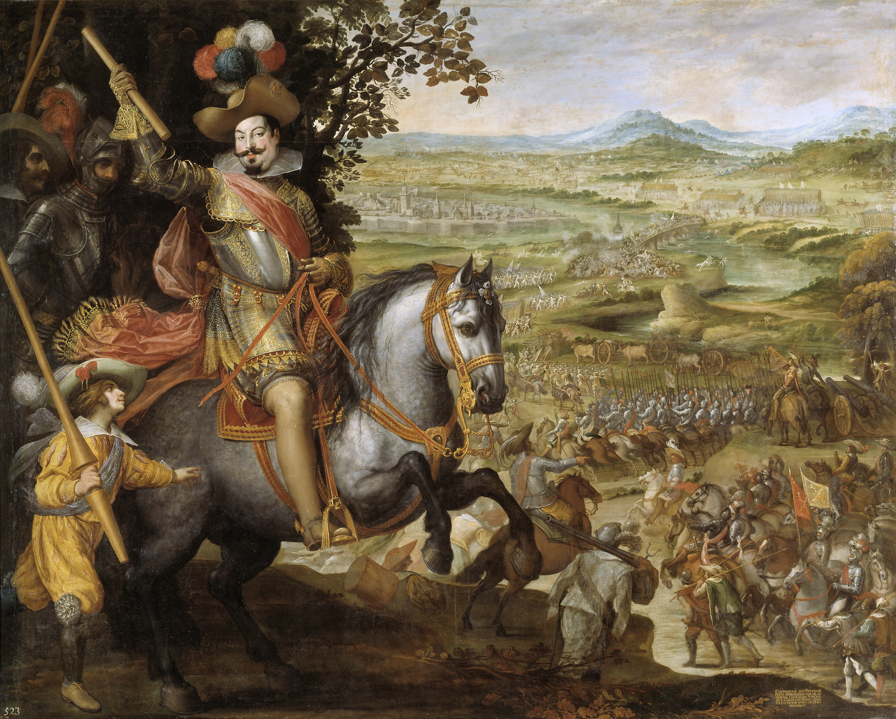 Vicente Carducho: Socorro de la plaza de Constanza (1634). Óleo sobre lienzo, 297 cm x 374 cm